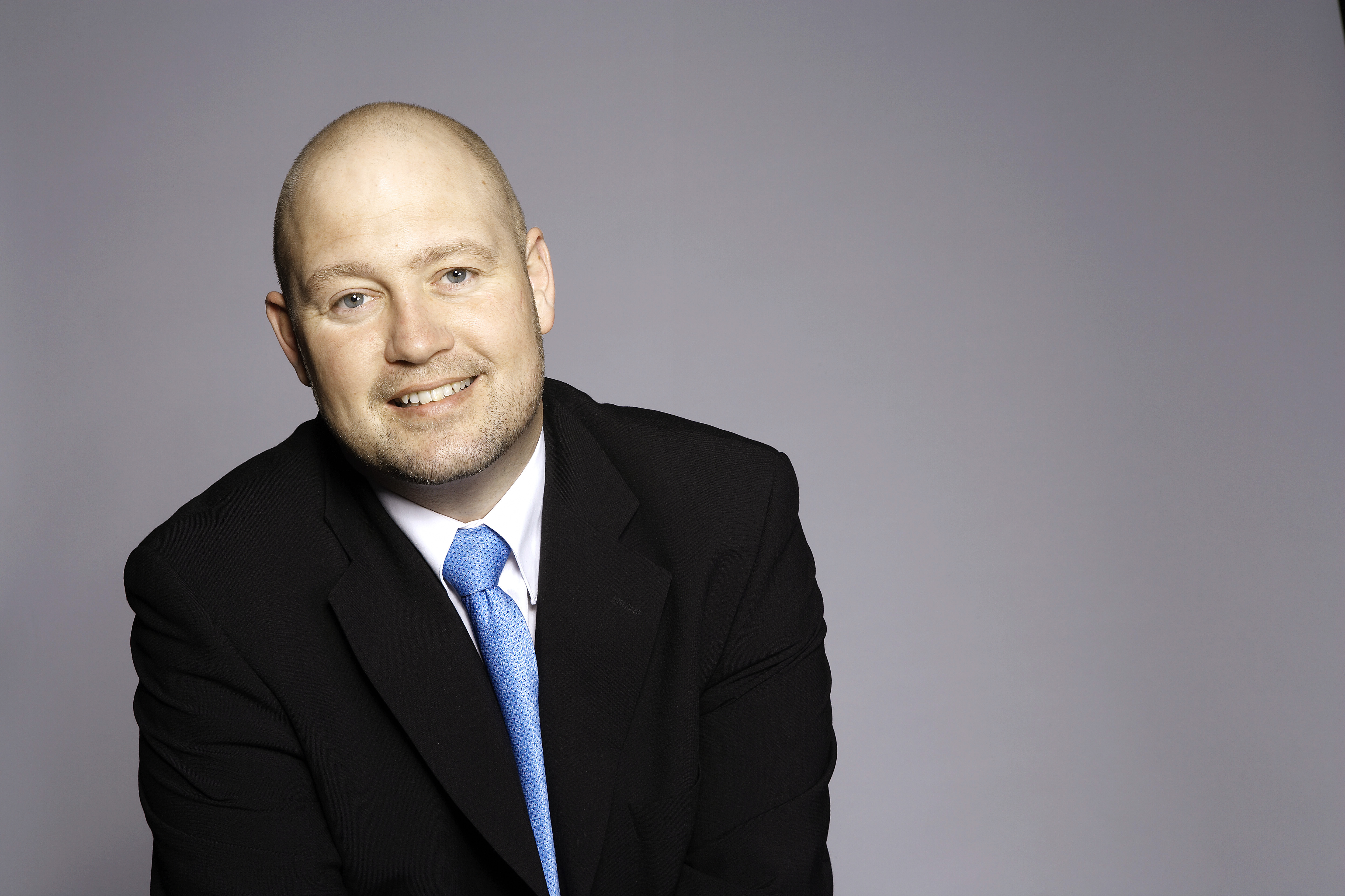 Anders Anundsen, FrP-politiker